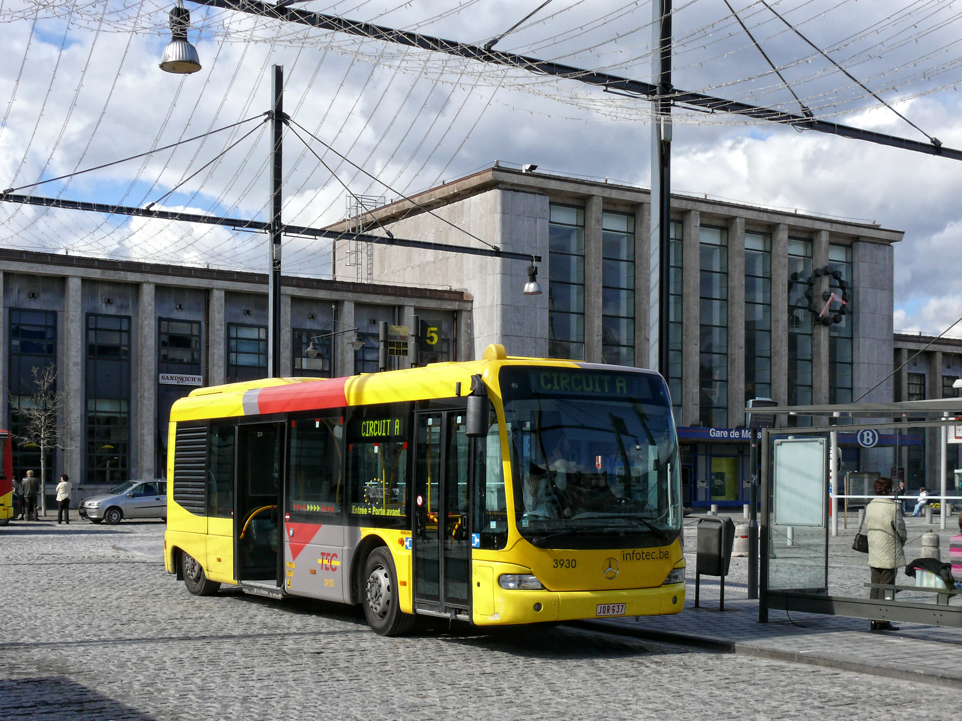 Ein Mercedes Cito am Bahnhofsvorplatz in Mons.